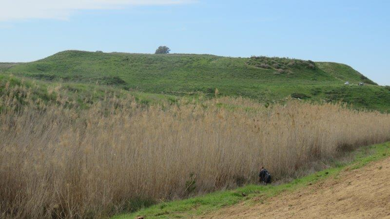 Pura Nature Reserve in the north Negev.